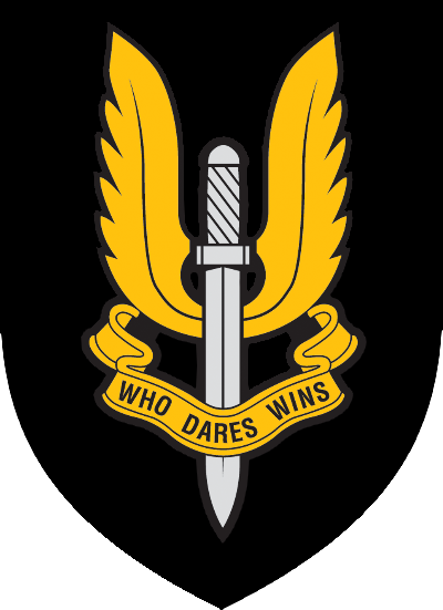 Emblema que representa al S.A.S. (Servicio Aéreo Especial)